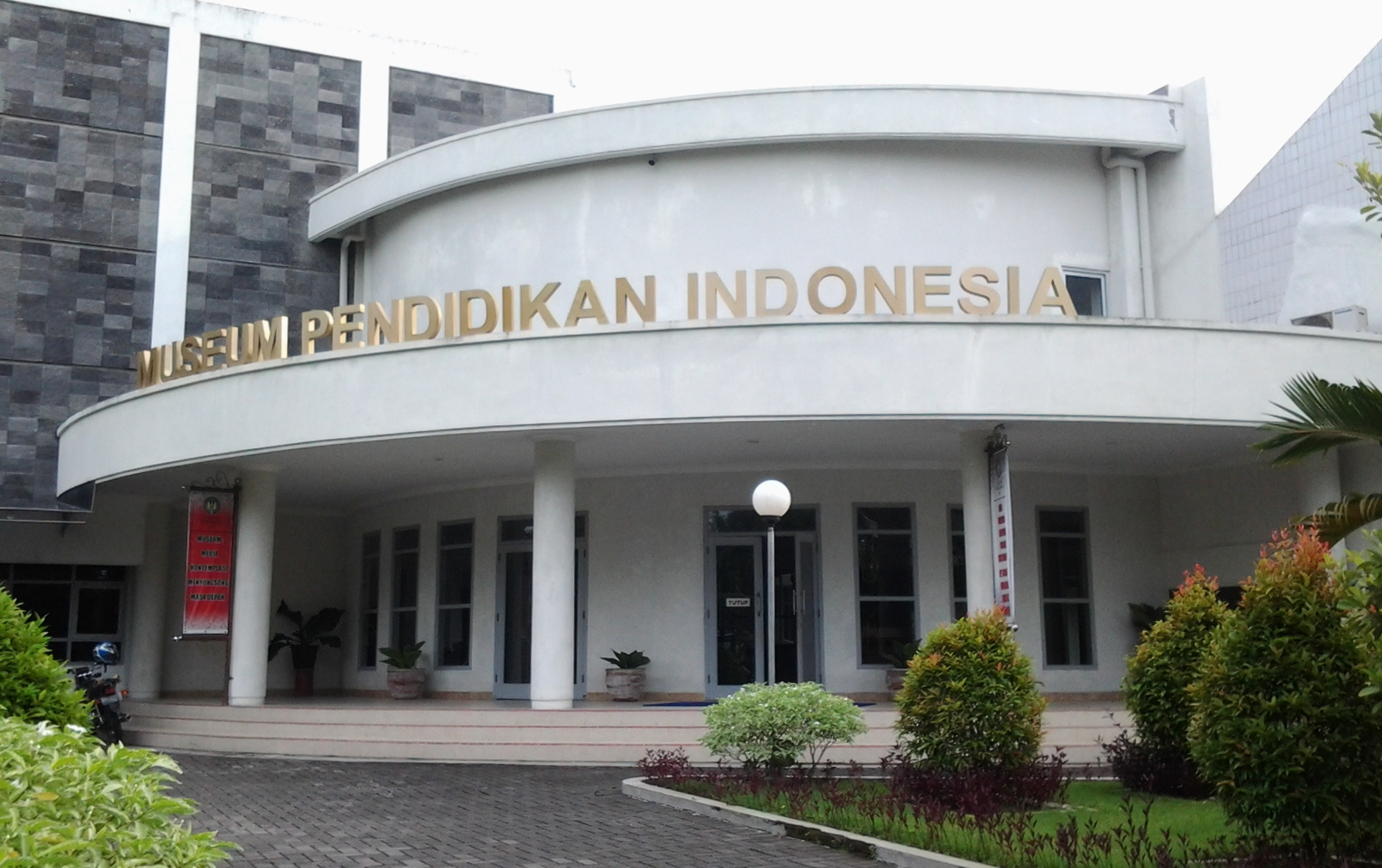 Museum Pendidikan Indonesia yang berlokasi di Kompleks Universitas Negeri Yogyakarta.